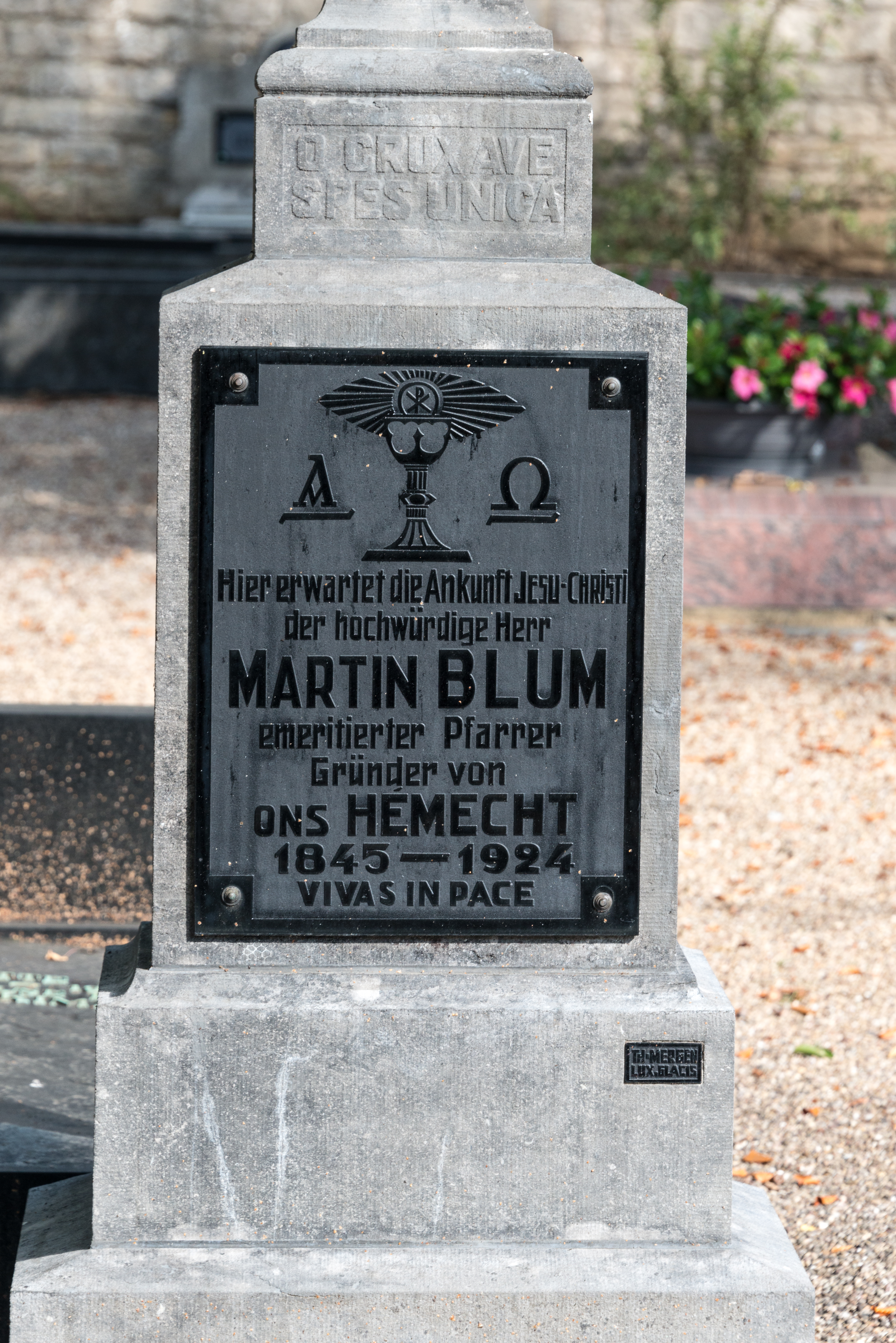 Graf Martin Blum um Nikloskierfecht.